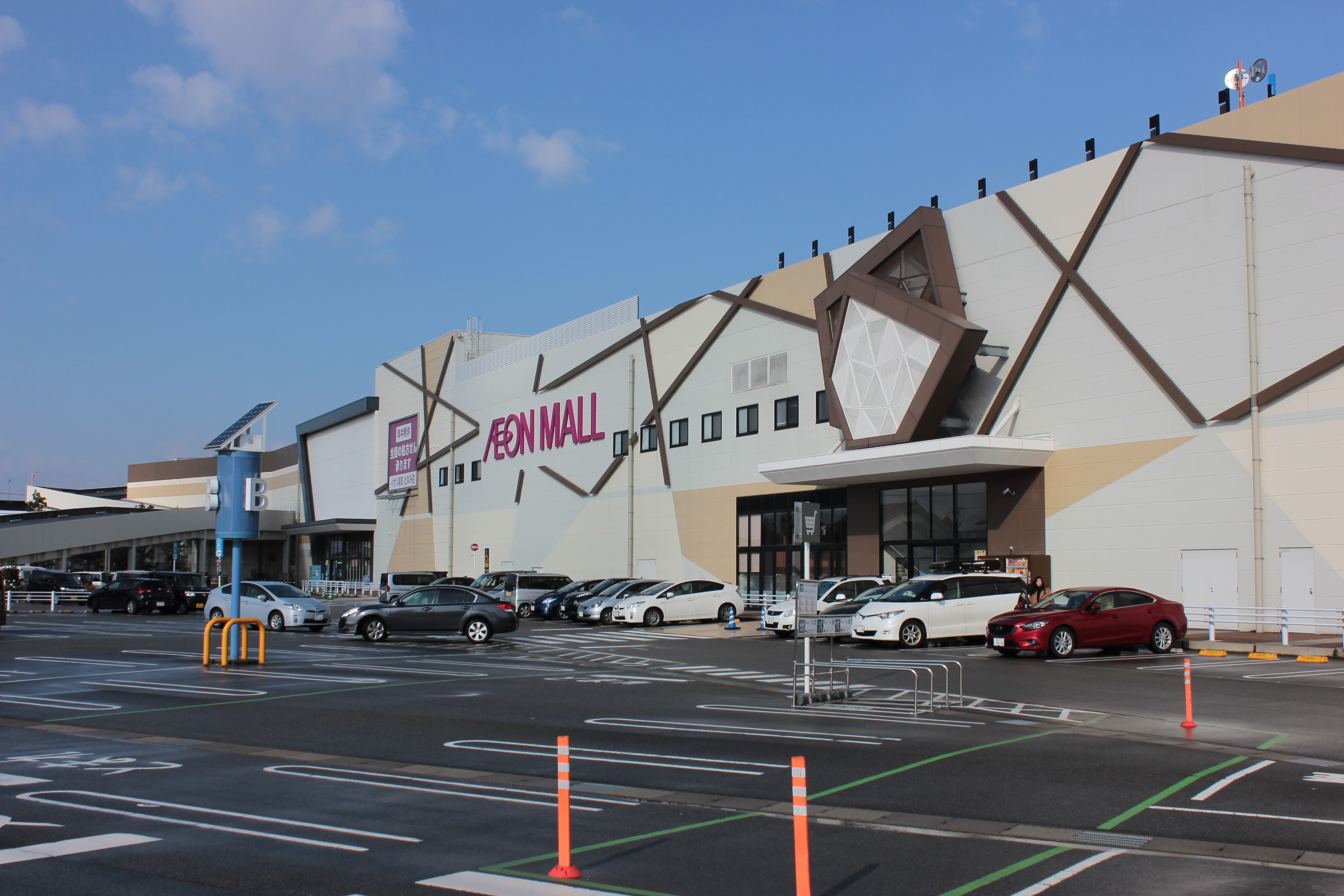 イオンモールとなみ（富山県砺波市） Canon EOS Kiss X5